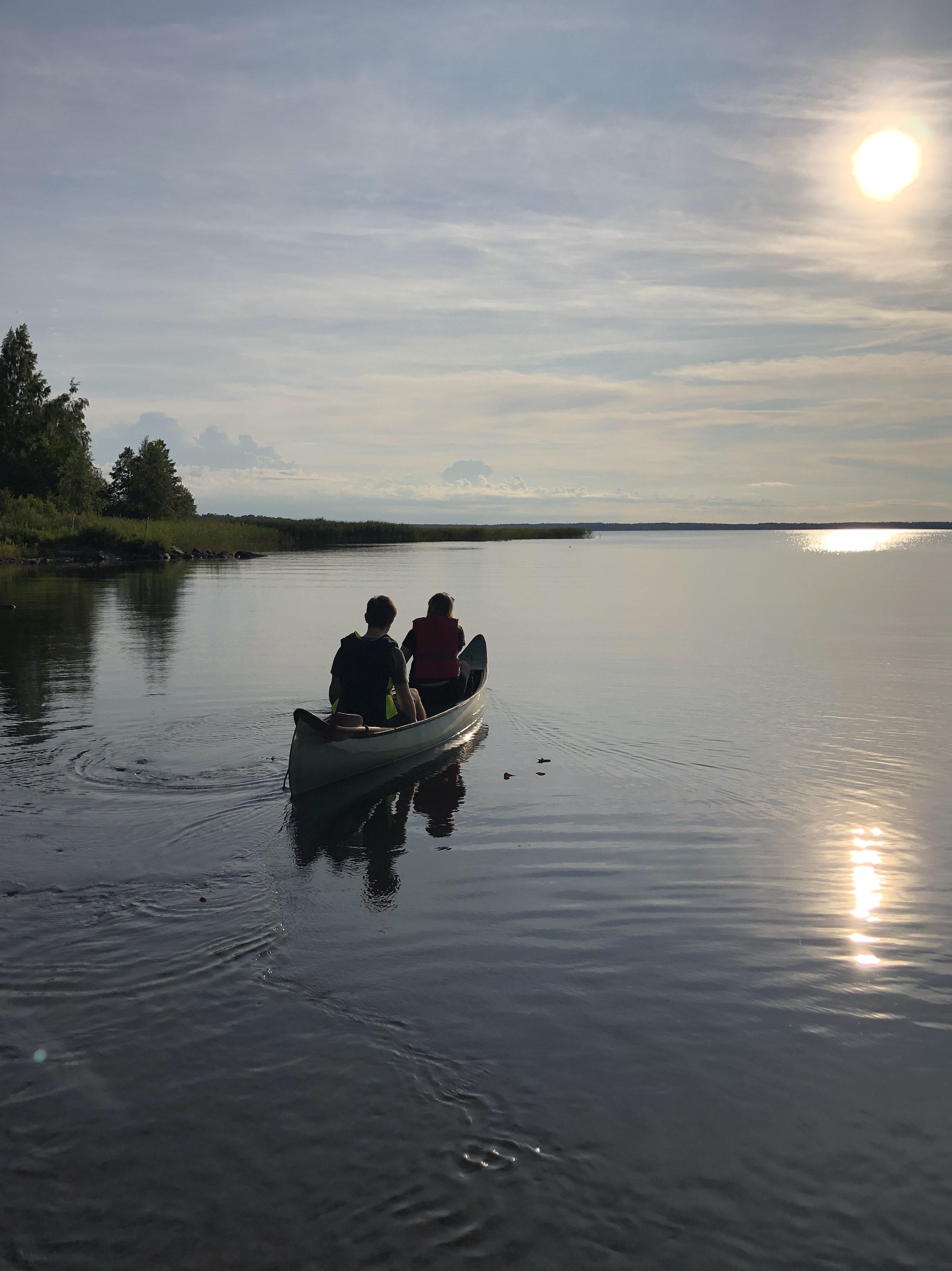 Kanotfärd på sjön Örlen i Fagersanna